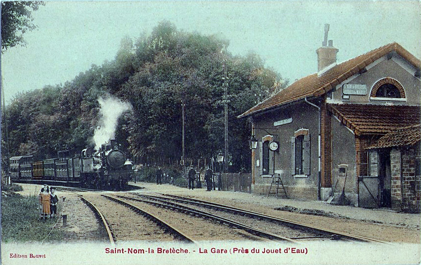 La gare de Saint-Nom-la-Bretèche - Forêt-de-Marly (Yvelines).